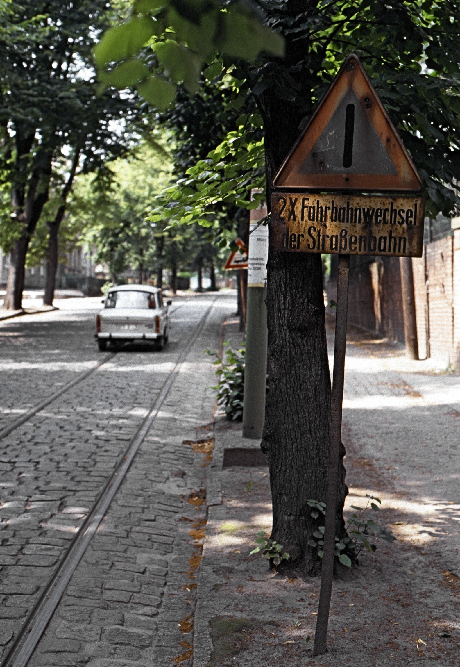 Verkehrszeichen in Woltersdorf, Schleusenstraße